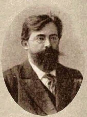 Фаусек Виктор Андреевич (13.01.1861, Саратов – 01.07.1910, Киев) – профессор зоологии, энтомолог, пропагандист женского образования, профессор Женского медицинского ин-та и директор СПб. Высших Женских курсов (1905–1910).